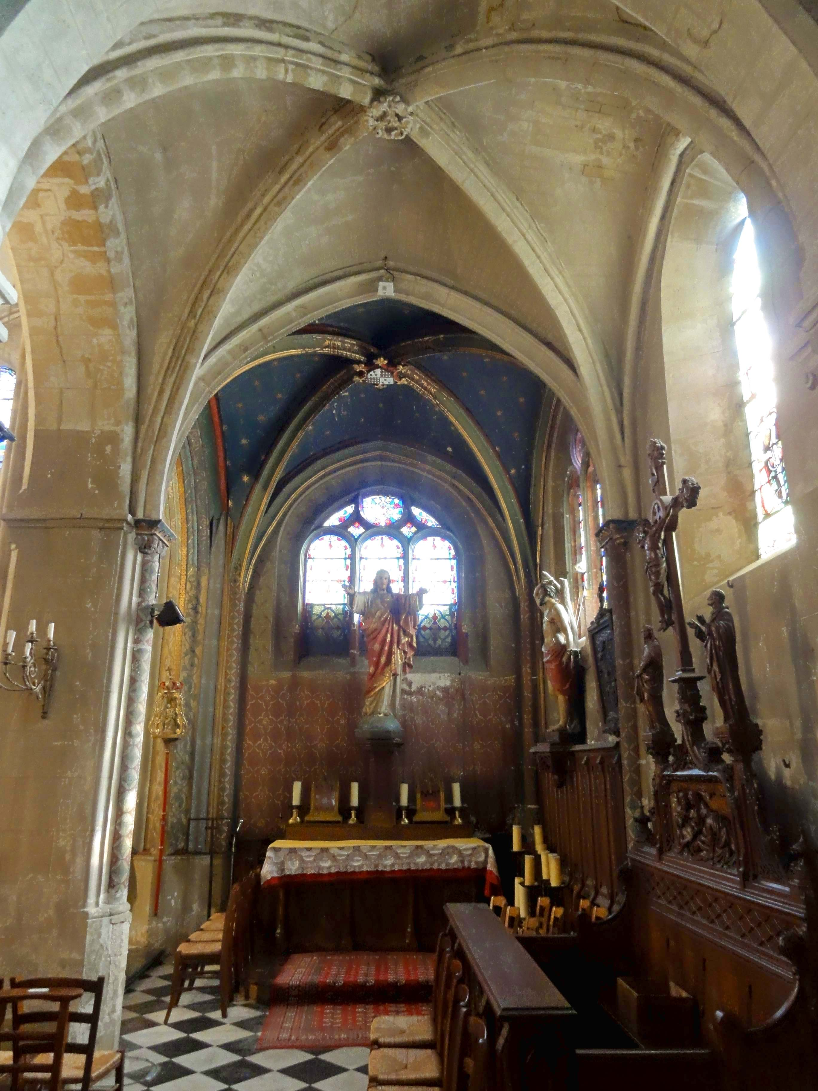 Voir titre.